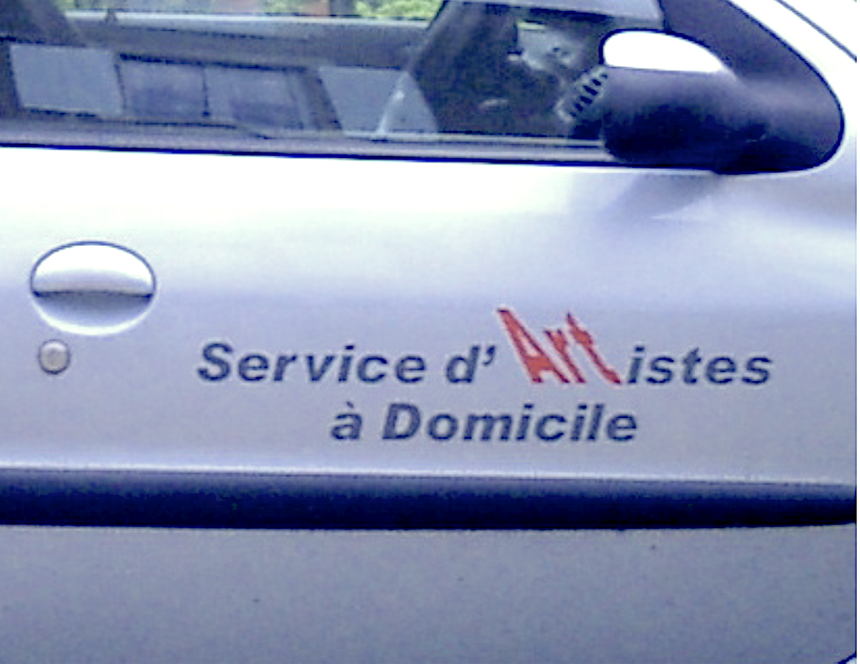 Service d'artiste à domicile, Photo Pascale Weber